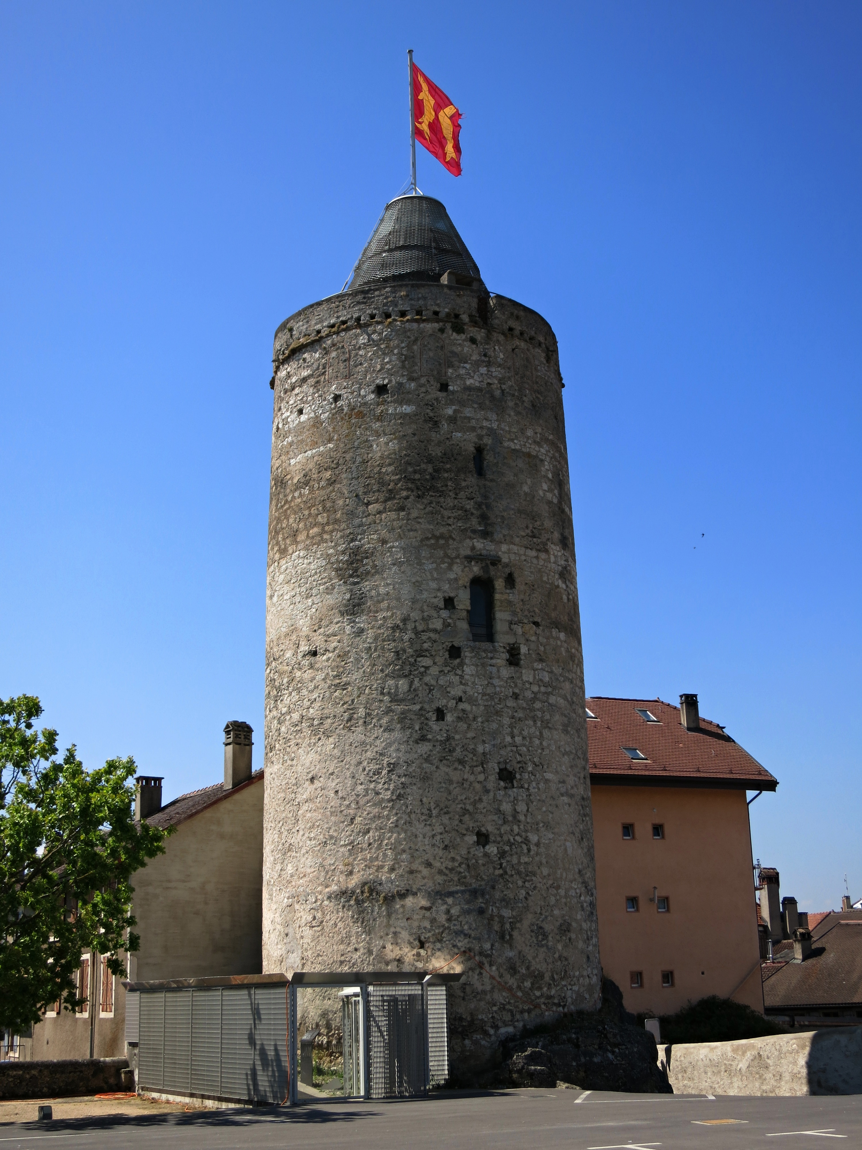 La Tour Ronde in Orbe